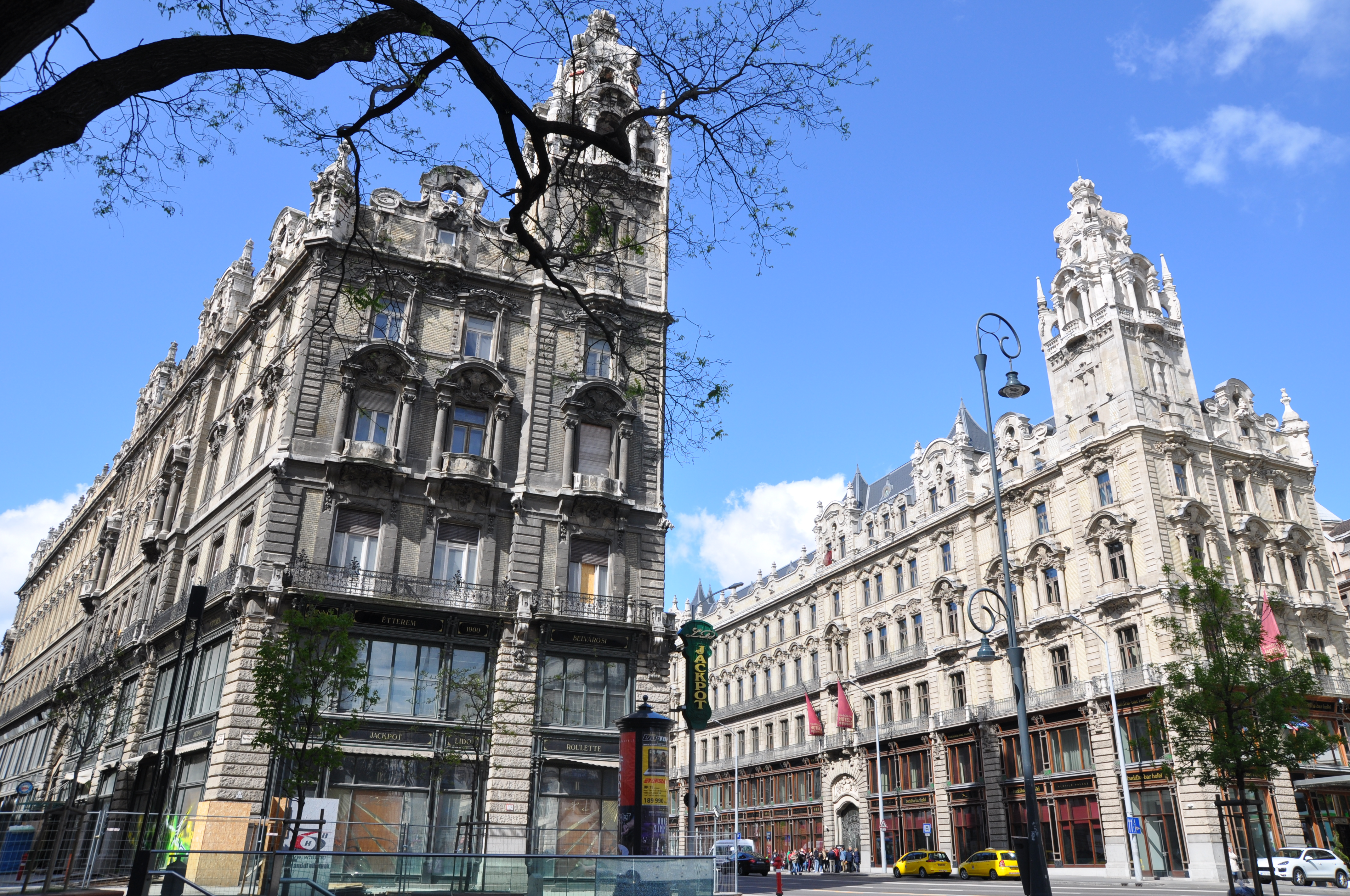 Budapest, Klotild paloták